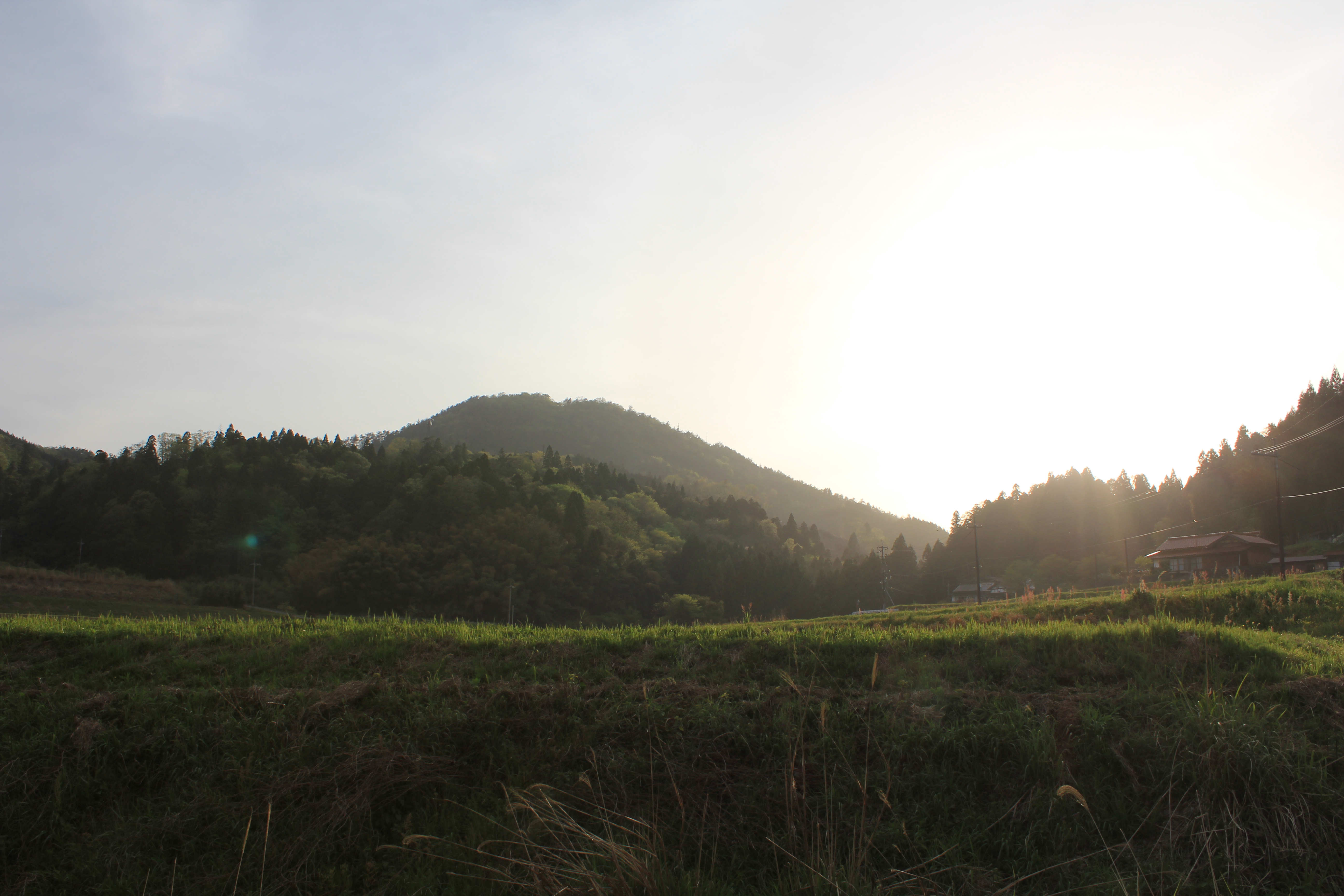 石見丸山城遠景